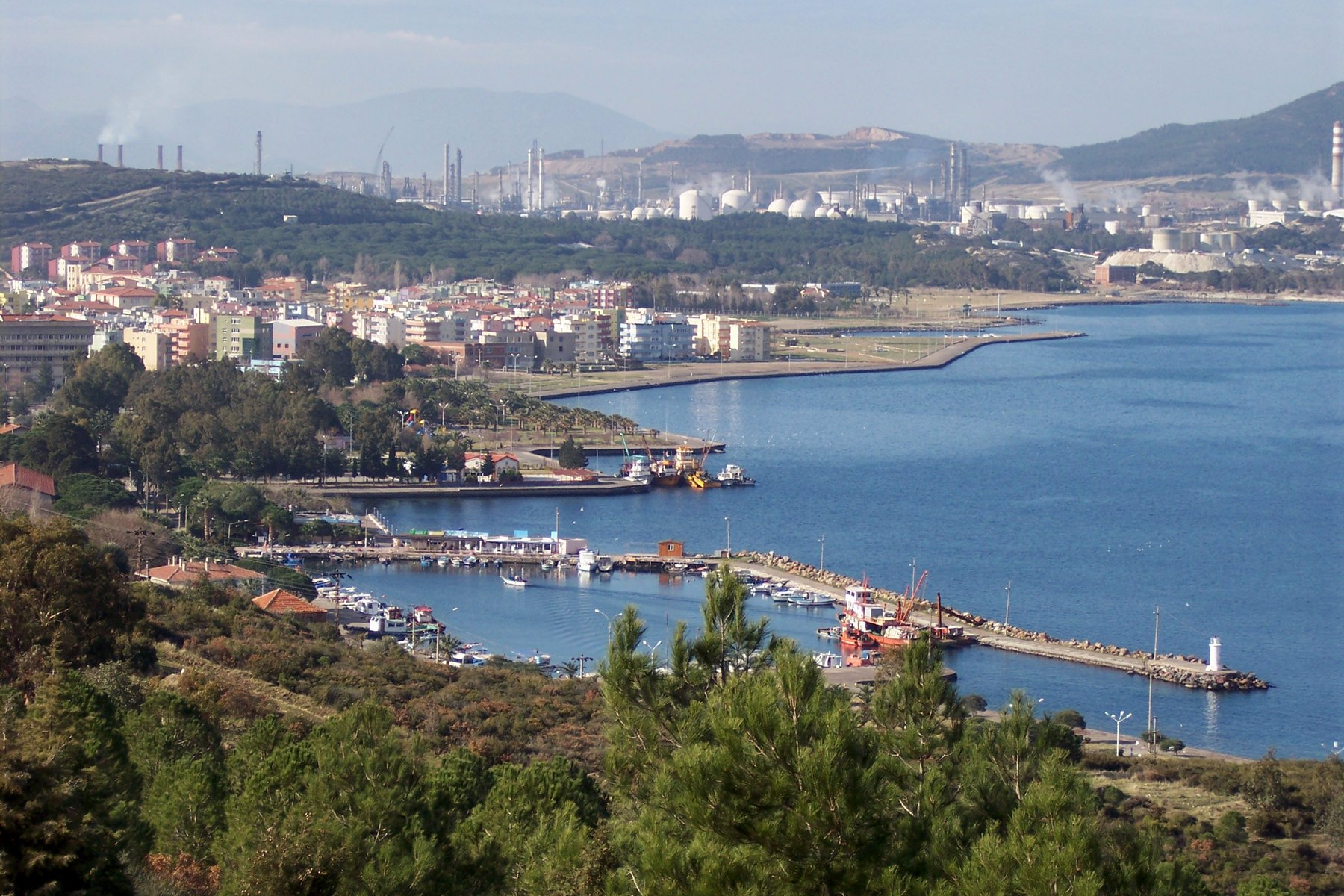 Aliağa